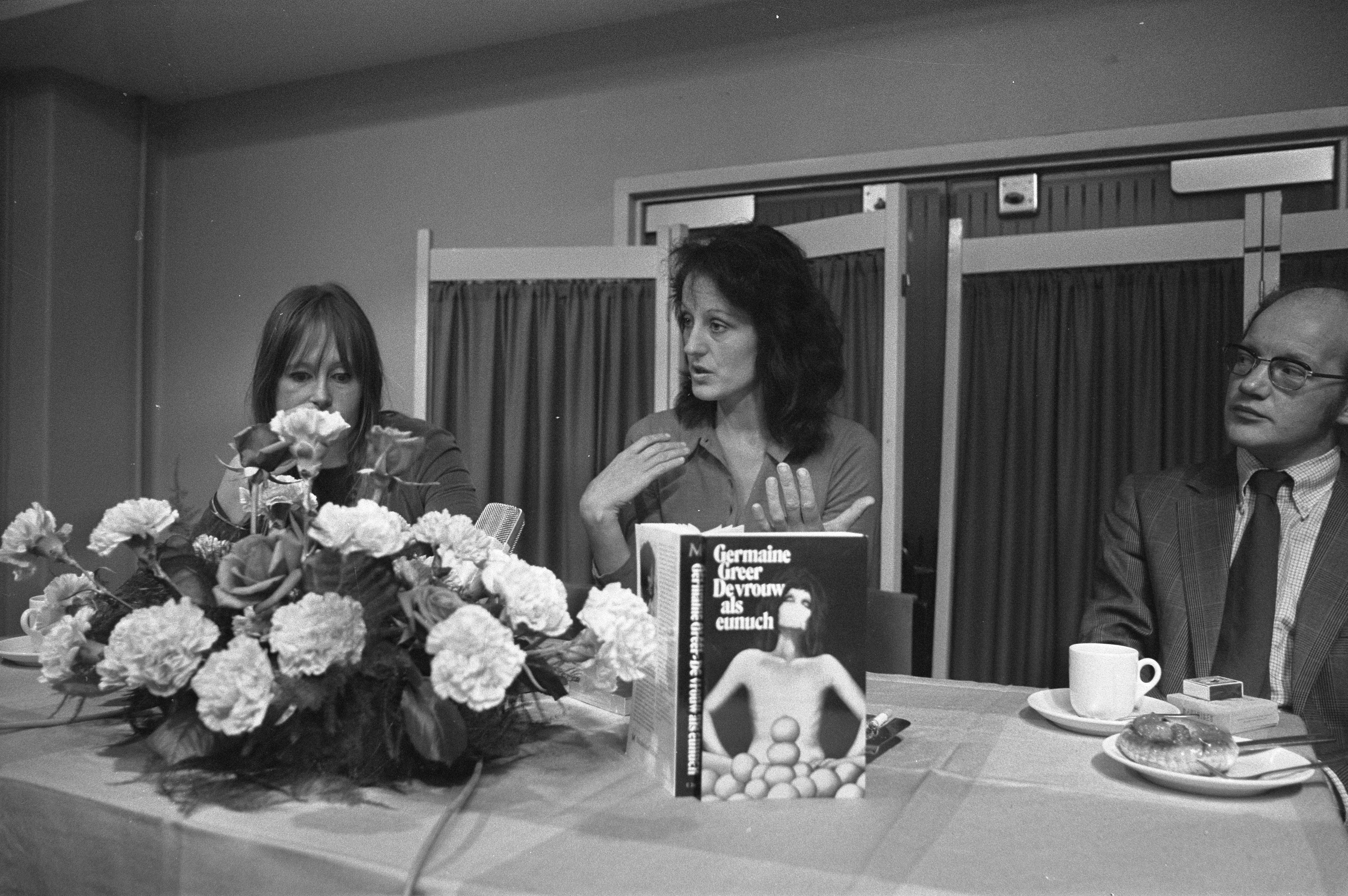 Collectie / Archief : Fotocollectie Anefo Reportage / Serie : De Australische literatuurwetenschapper en publiciste Germaine Greer tijdens de presentatie van haar boek "De vrouw als eunuch" (vertaling van "The Female Eunuch" uit 1970) in de Bijenkorf (vermoedelijk in Amsterdam) Beschrijving : schrijvers, literatuur, taal- en literatuurwetenschap, feminisme, vrouwenemancipatie Datum : 6 juni 1972 Trefwoorden : feminisme, literatuur, schrijvers, taal- en literatuurwetenschap, vrouwenemancipatie Persoonsnaam : Greer, Germaine Fotograaf : Fotograaf Onbekend / Anefo Auteursrechthebbende : Nationaal Archief Materiaalsoort : Negatief (zwart/wit) Nummer archiefinventaris : bekijk toegang 2.24.01.05 Bestanddeelnummer : 925-6492